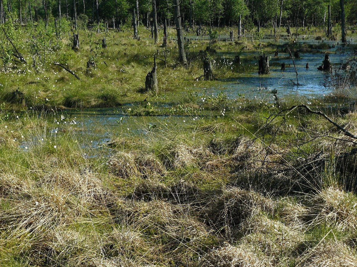 Wiedervernässungsfläche im Naturschutzgebiet „Feerner Moor""